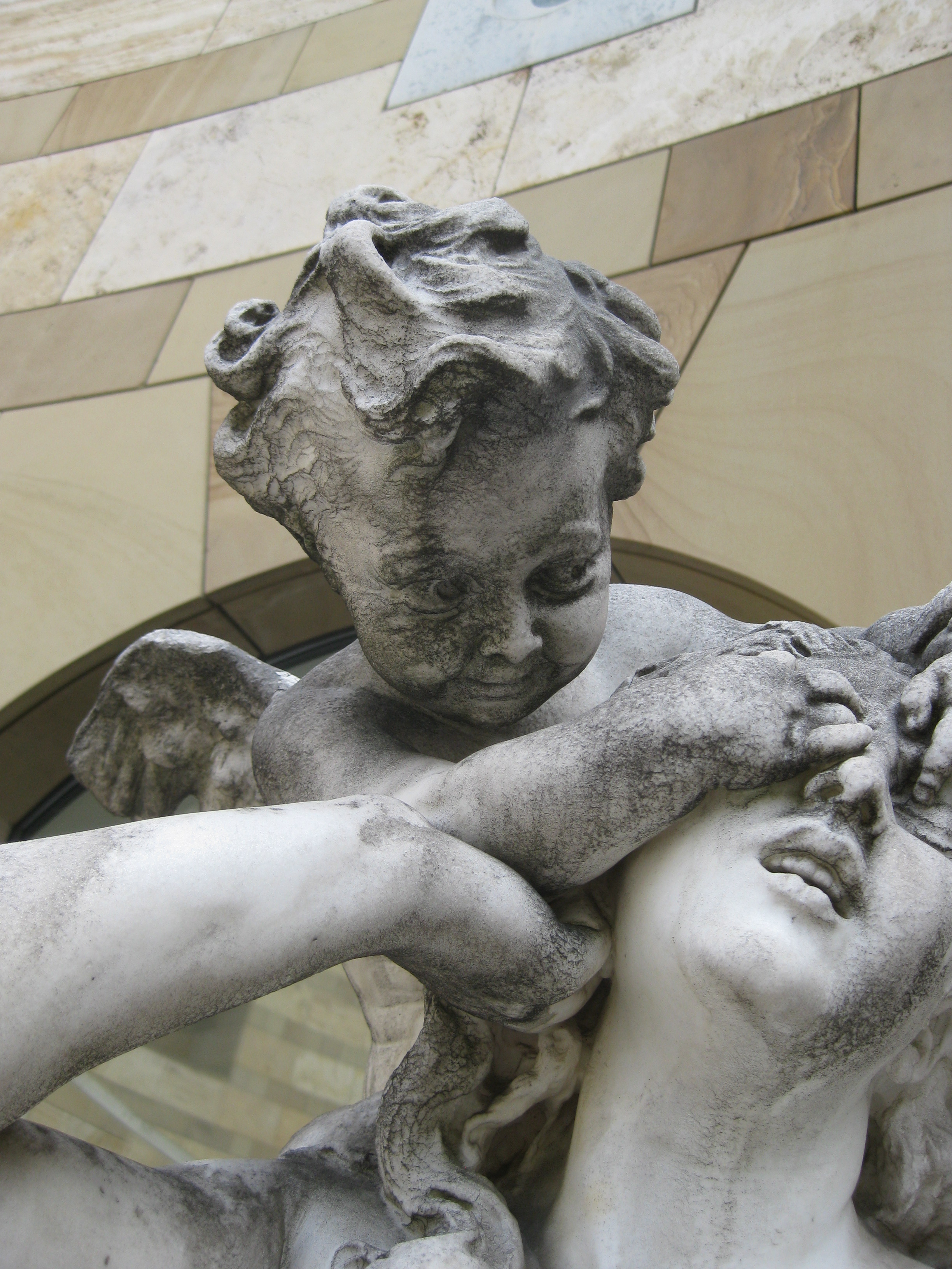 Donato Barcaglia (1849-1930): Liebe macht blind, Ausschnitt, figurative Darstellung des Sprichworts „Liebe macht blind“ in einer klassizistischen Rundplastik auf runder, profilierter Plinthe mit Rosenstock, Marmor, quaderförmiger Steinsockel, lebensgroß, bezeichnet: „D. Barcaglia Milano 1884“, Entstehungsjahr 1884, nach 1925: Stuttgart, Villa Berg, oberer Absatz des unteren Treppenhauses, nach dem Zweiten Weltkrieg: Stuttgart, Städtisches Lapidarium, heute: Stuttgart, Staatsgalerie, Rotunde (als Leihgabe des Städtischen Lapidariums). Erhaltungszustand: fehlende Zehen am linken Fuß der Frau, Putte mit abgebrochenem Flügel und Füßen, Rosenstock verwittert, Schwärzungen. Eine nackte Schöne von sinnlicher Weiblichkeit wehrt sich zaghaft gegen den Angriff eines geflügelten und gelockten Amorknaben, der sie hinterrücks überfällt und sich auf ihrem Rücken festsetzt. Ihr Antlitz, umrahmt von wallenden Botticelli-Ringellocken, spiegelt die Leidenschaft, ihr halbgeöffneter Mund die Atemlosigkeit der Begierde. Der Putto verschließt ihr mit seinen dicken Fingerchen die Augen, die gar nichts sehen wollen, weil sie von dem Geliebten träumt.